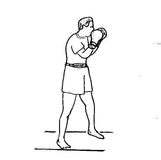 garde_rentrée1.jpg